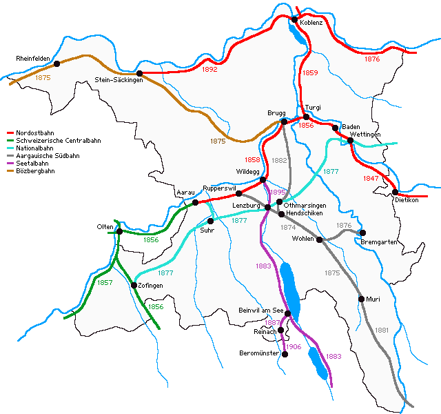 Entwicklung des Eisenbahnnetzes im Aargau bis 1900